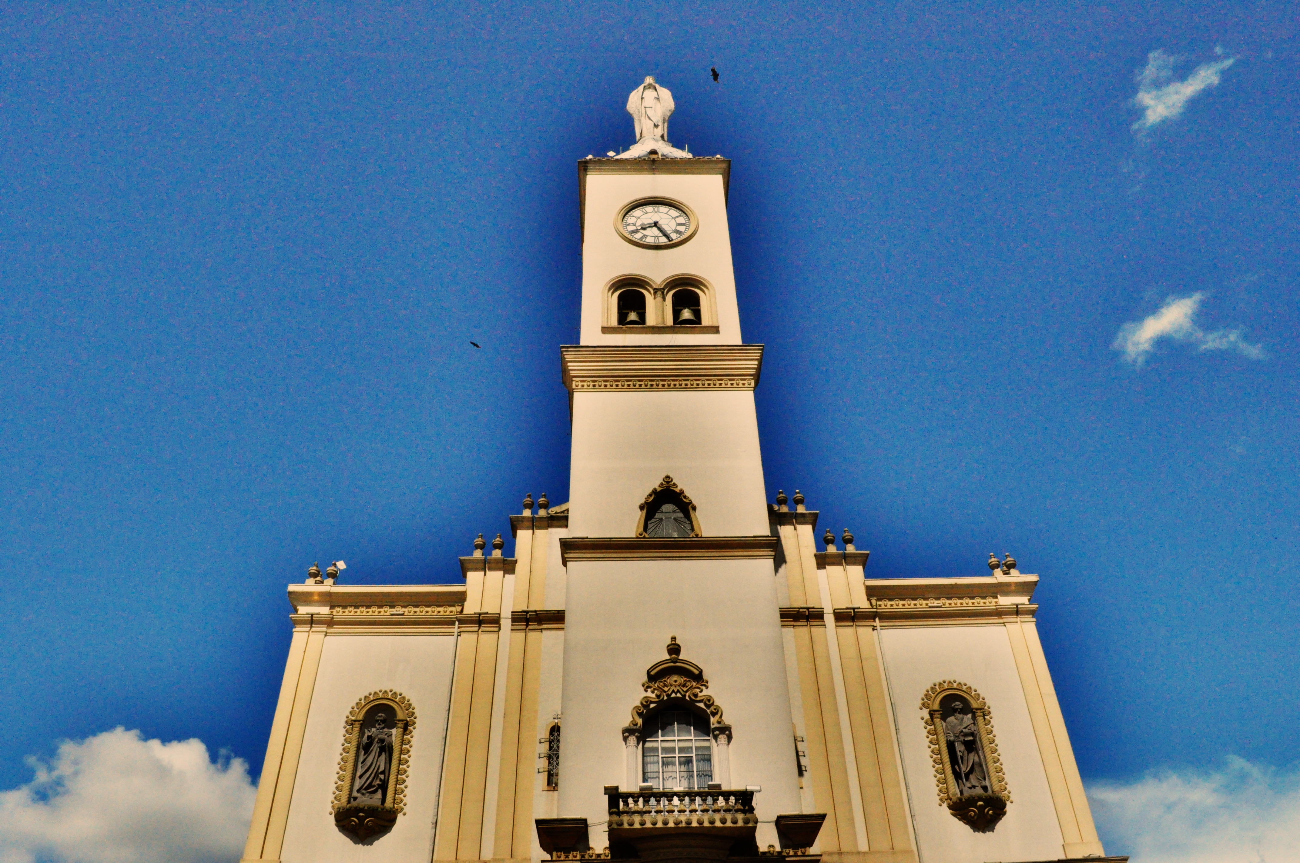 Catedral de Apucarana - Paraná - Brasil